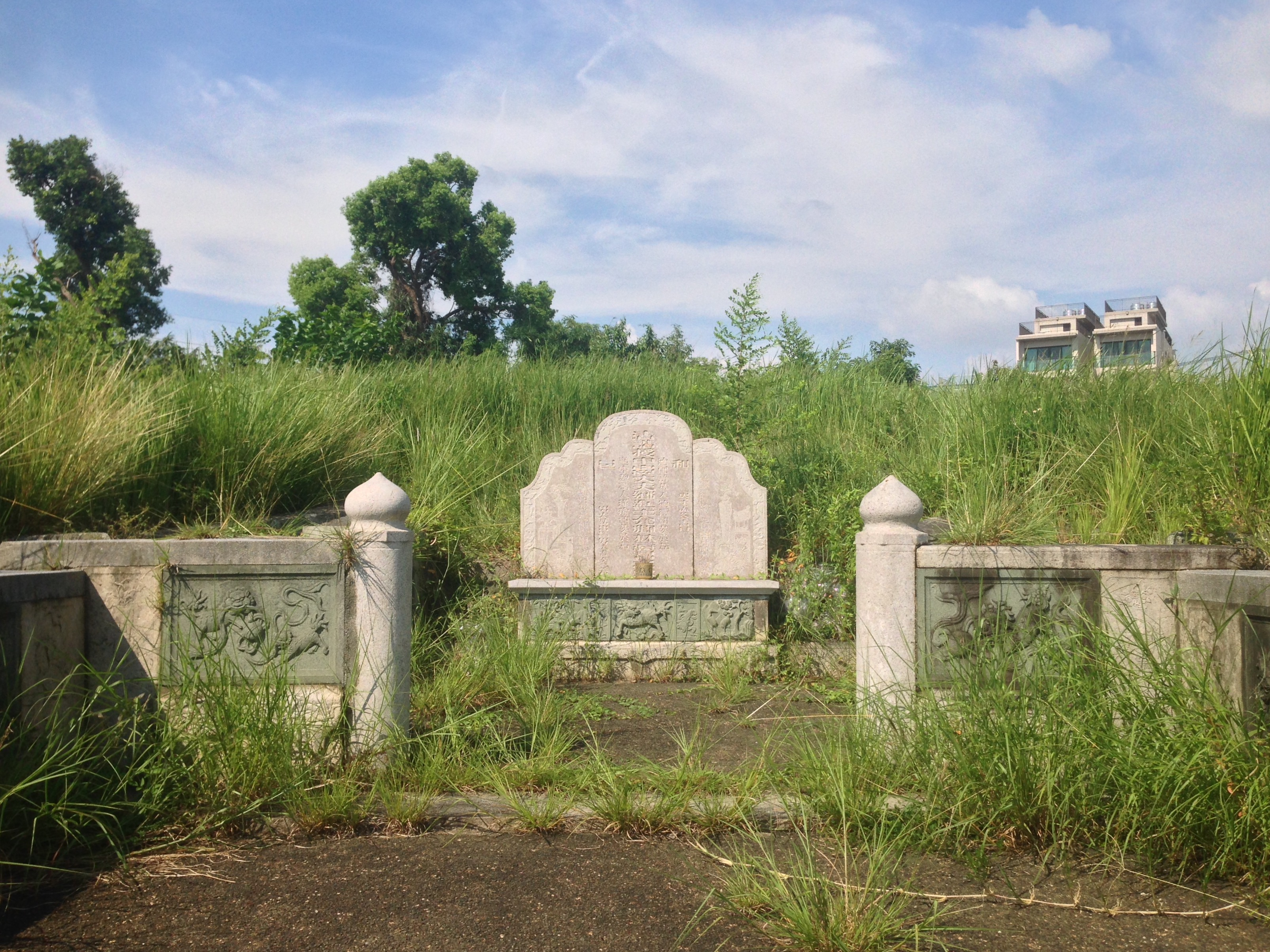 中文（台灣）: 林允卿進士墓